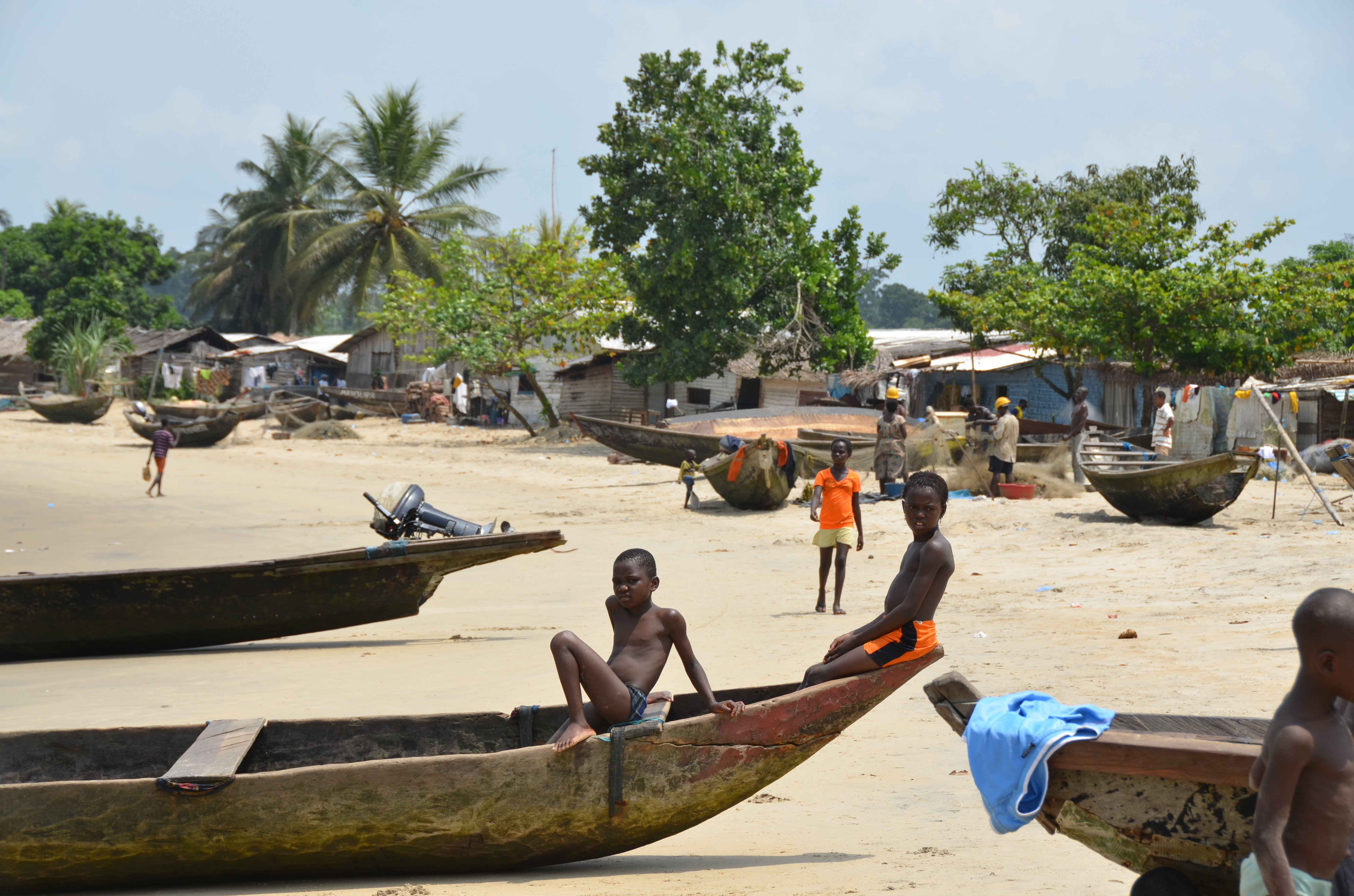 Pirogues de pêcheurs à Londji